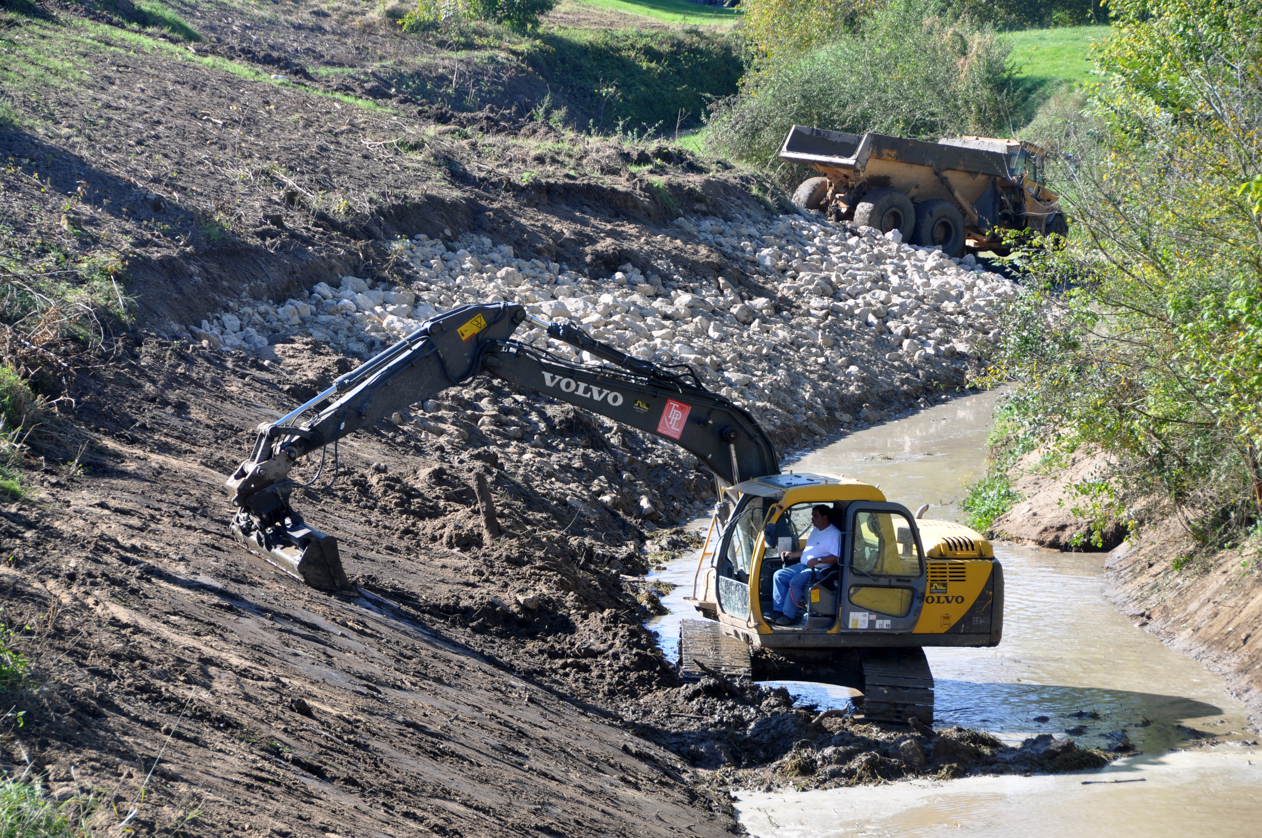 Travaux de renforcement de la levée de Loire au droit du Rio sur la commune de Saint-Denis-en-Val (Loiret, France) (2010)